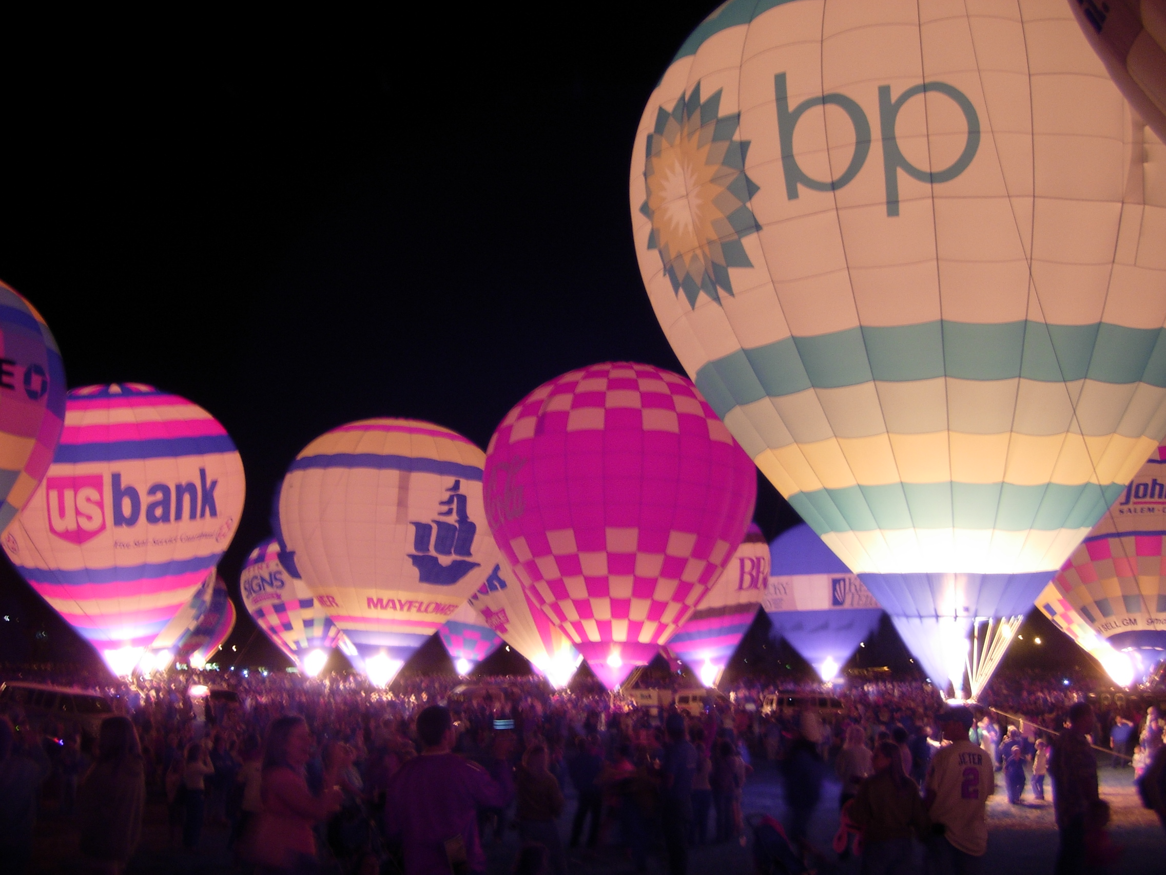 Louisville Balloon Glow 2006, Louisville, Kentucky, USA